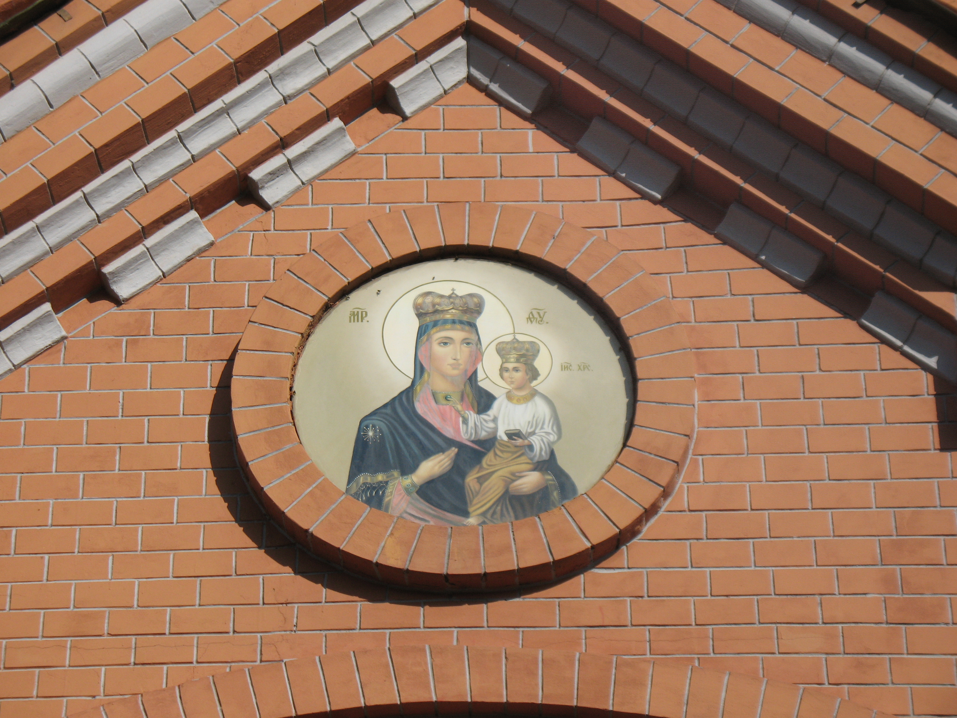 Свято-Озерянская церковь в Харькове, фасад, портик, Озерянская икона.